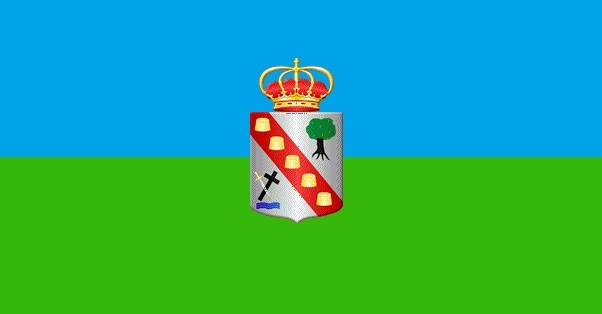 Bandera quintanilla del agua